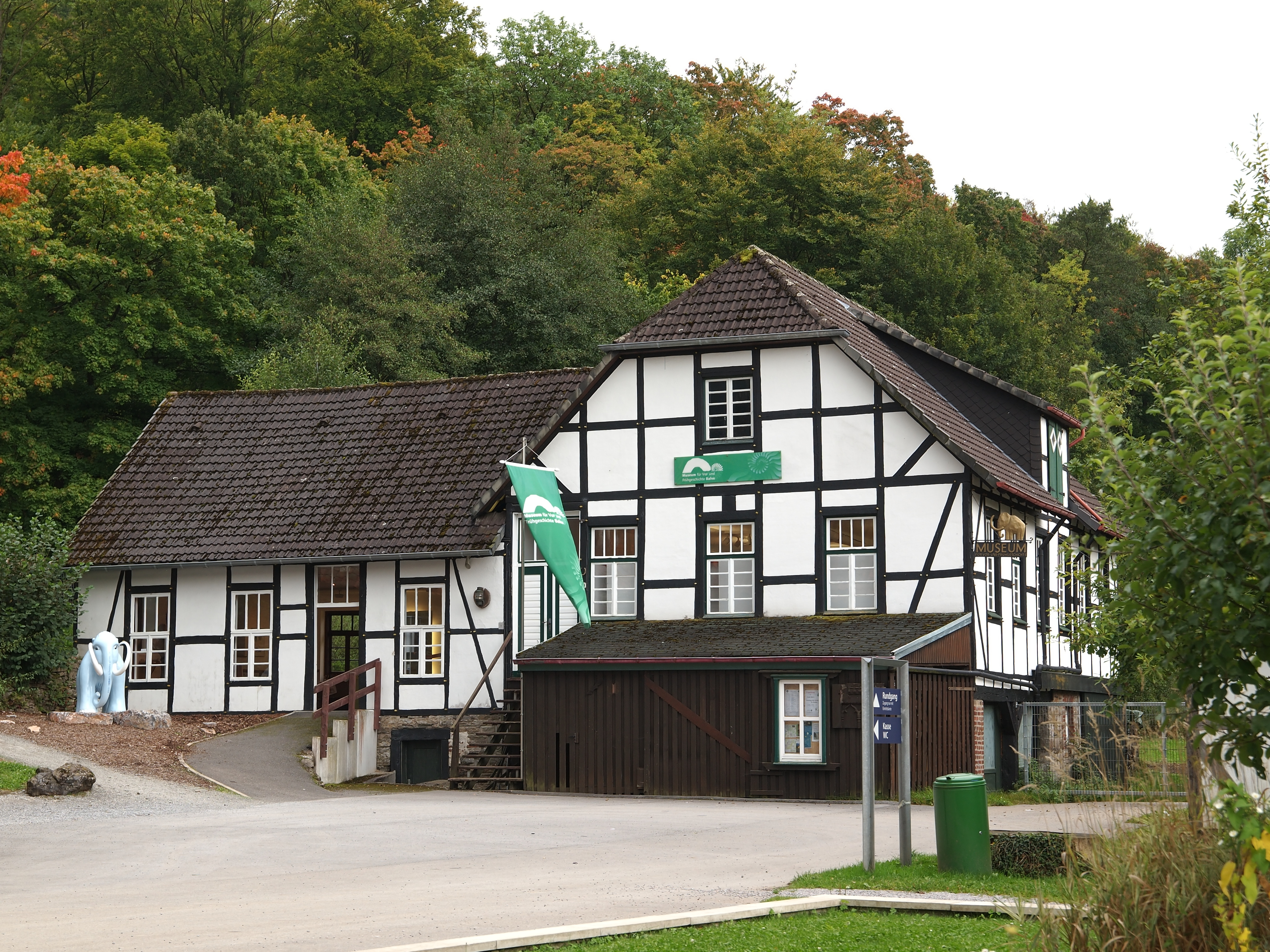 Balve, Luisenhütte Wocklum - Gebäude des Museums für Vor- und Frühgeschichte